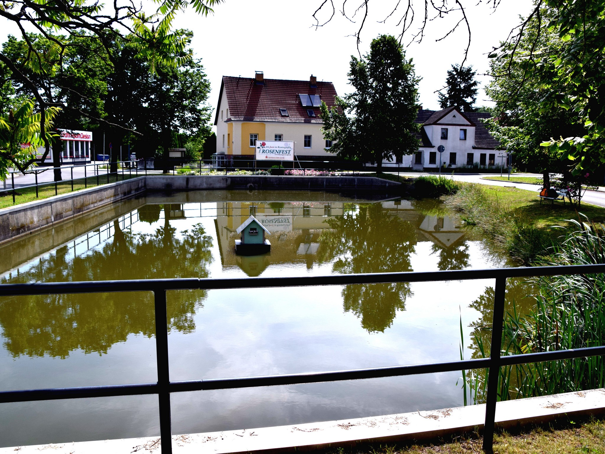 Teich am Lindenplatz, Rosengarten. Frankfurt (Oder), Deutschland